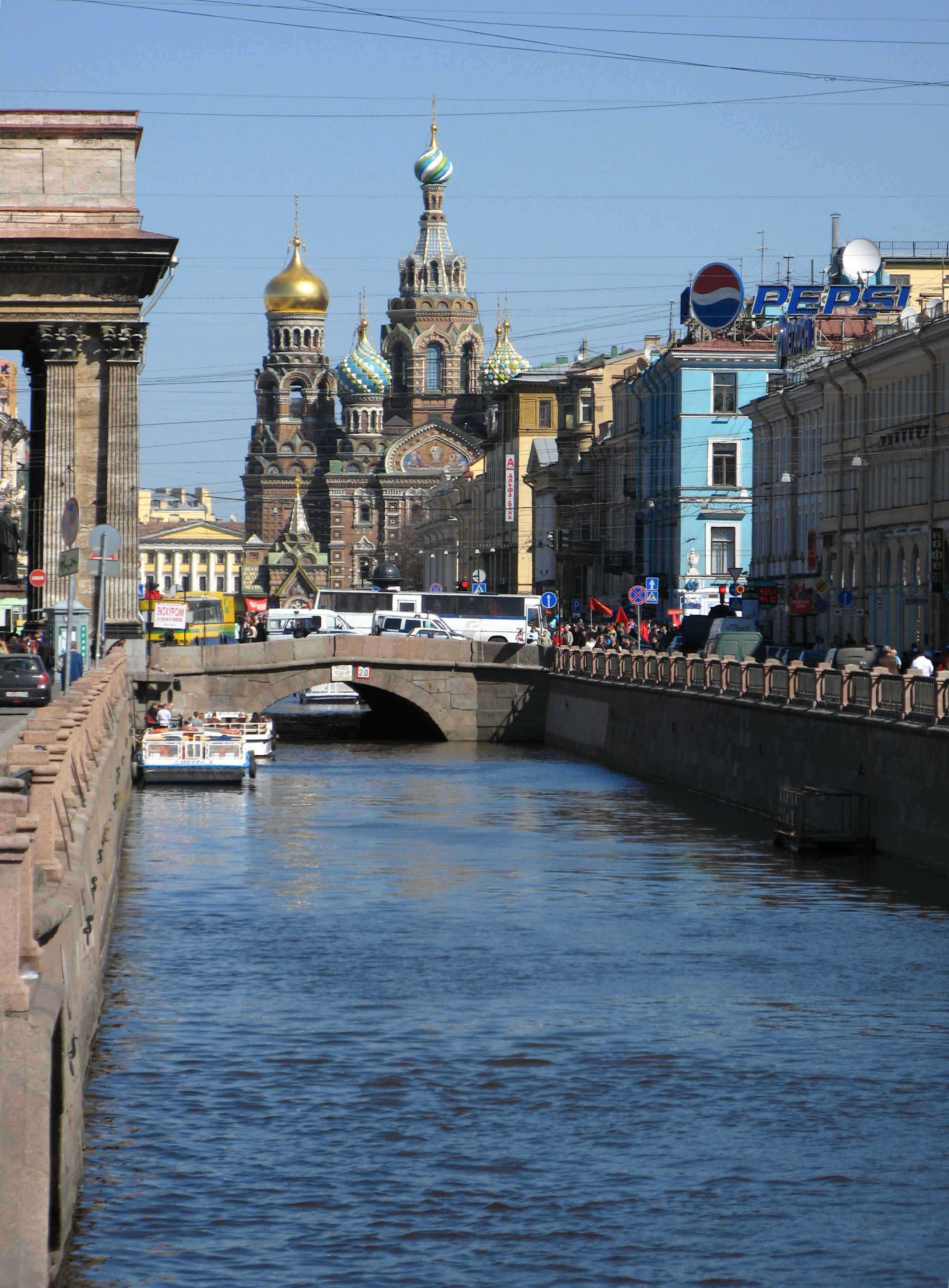 Грибоједов канал. Сант Петербург.